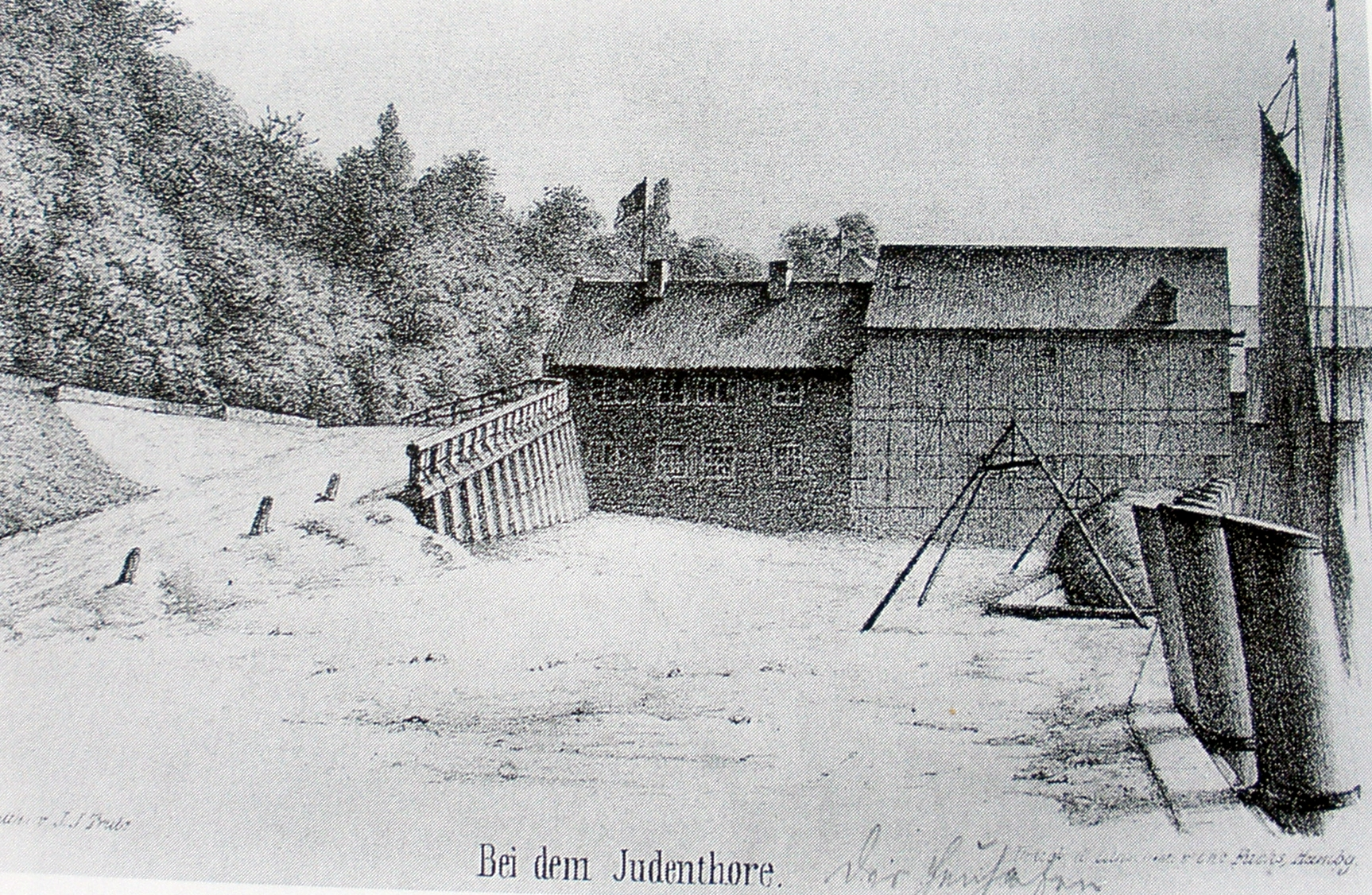 große elbstraße 222 altona - bei dem judenthore